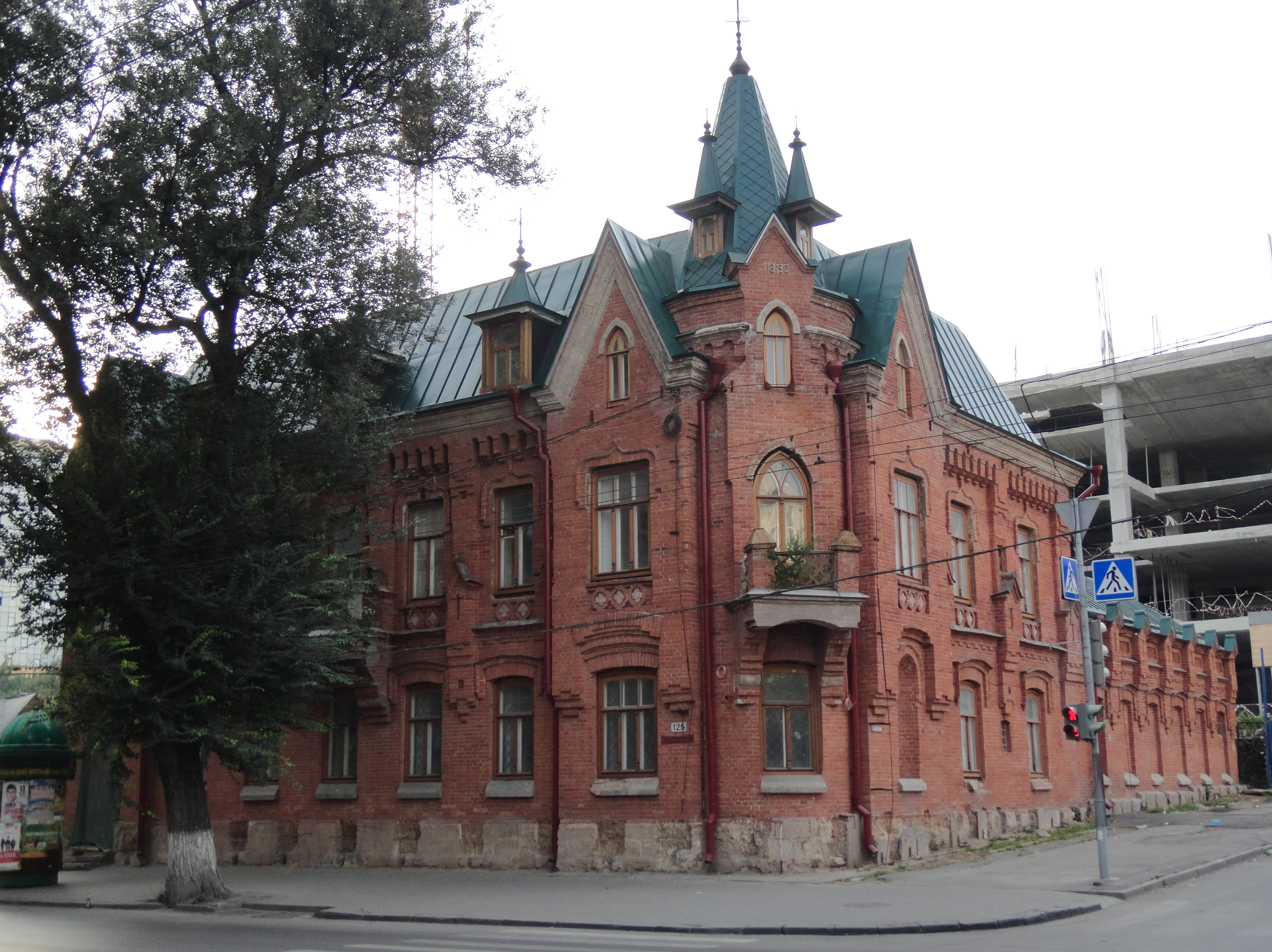 Дом братьев Мартын (Ростовская область, Ростов-на-Дону, Большая Садовая улица, 125)